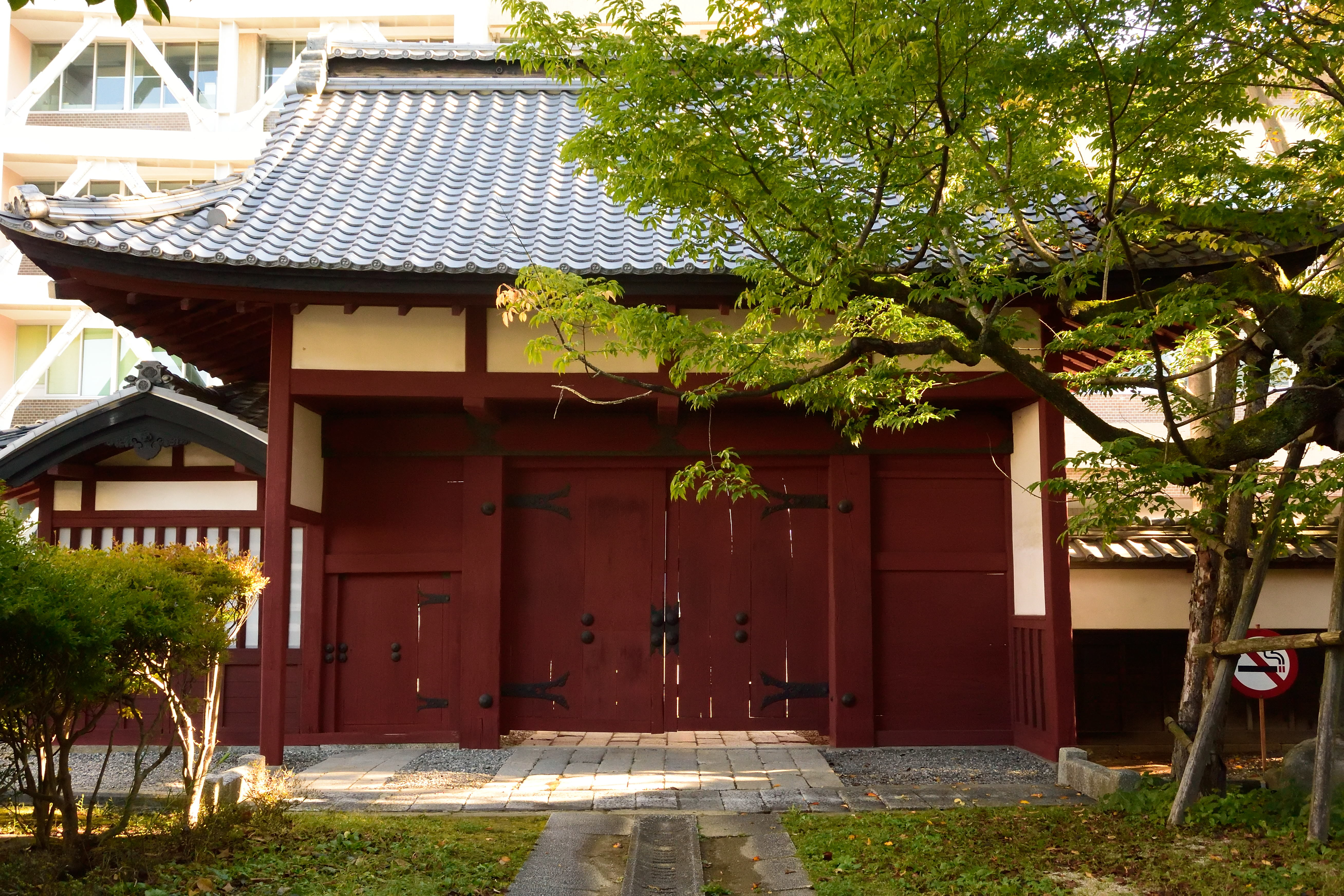 飯田城赤門